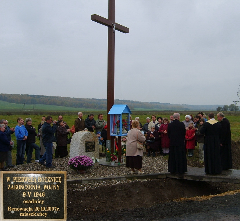 Poświęcenie Krzyża Rakowice Wielkie 27-10-2007